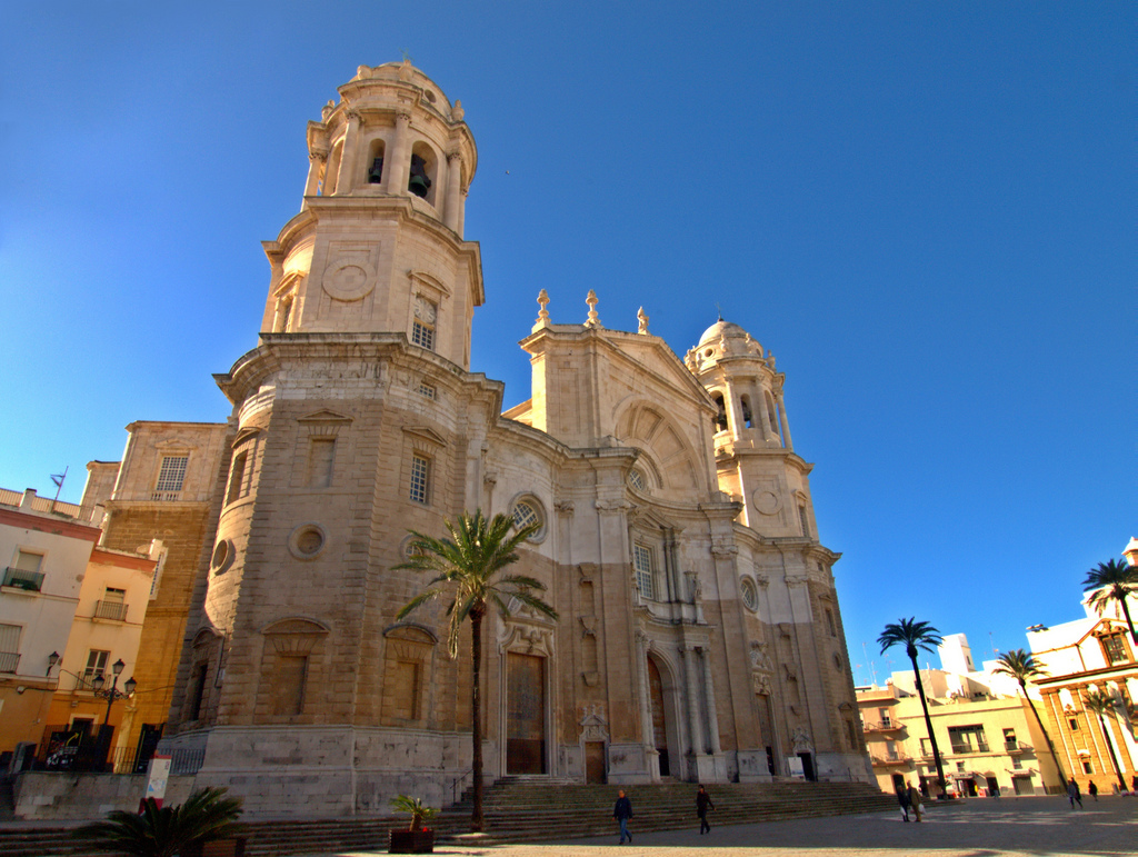 Vista desde el lado de la torre de levante de la Catedral de Cadiz